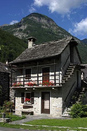 Rustico in Brione